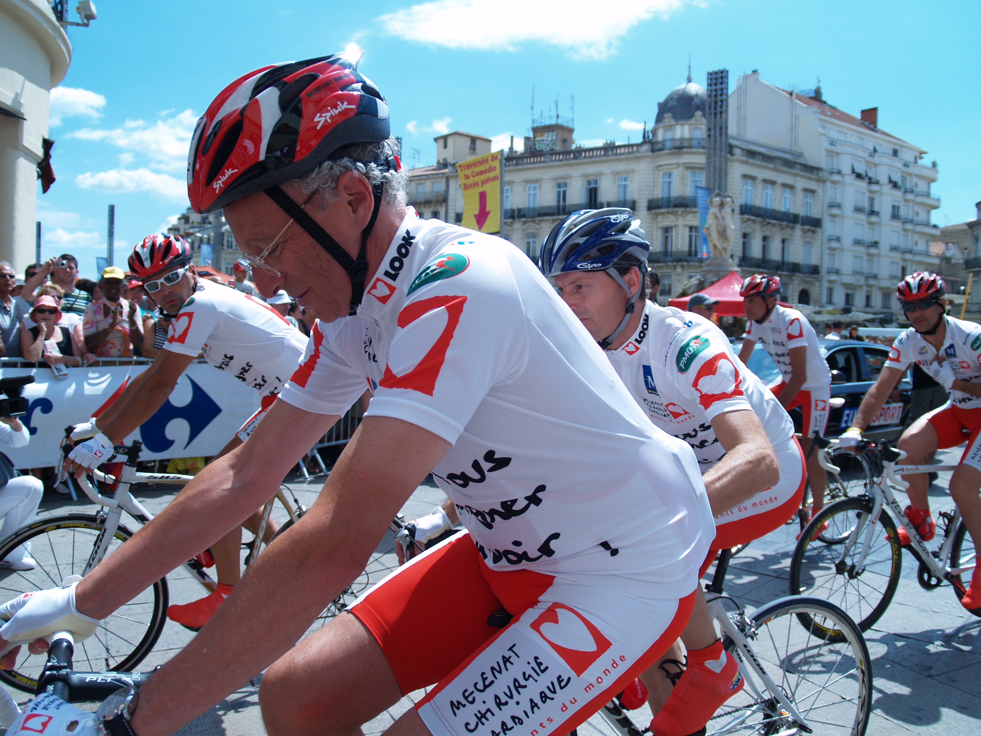 Nelson Monfort lors de l'opération "On a tous un coeur" place de la comédie à Montpellier durant le tour de France 2009.